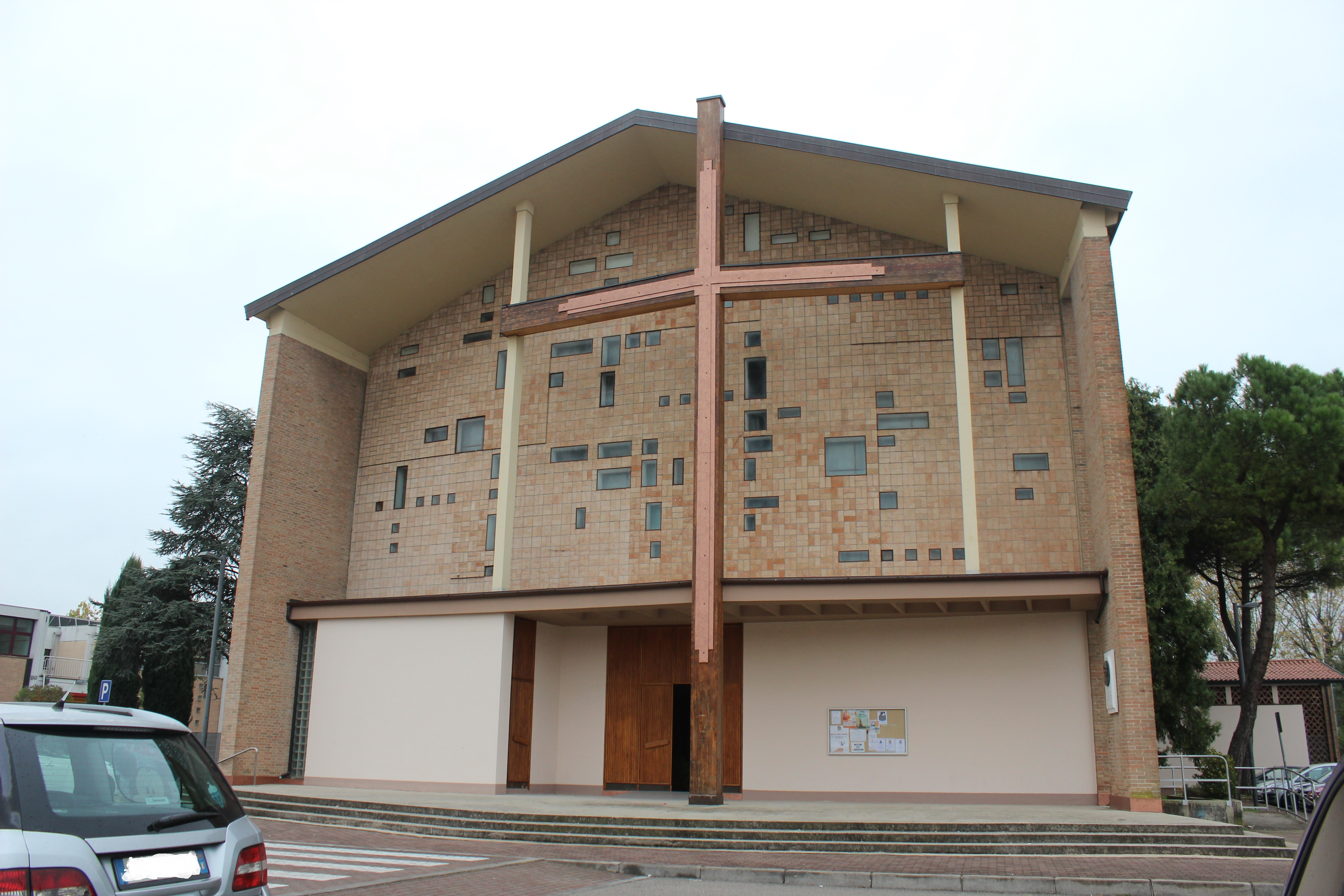 Chiesa dei Santi Angeli Custodi vista da davanti, Padova.